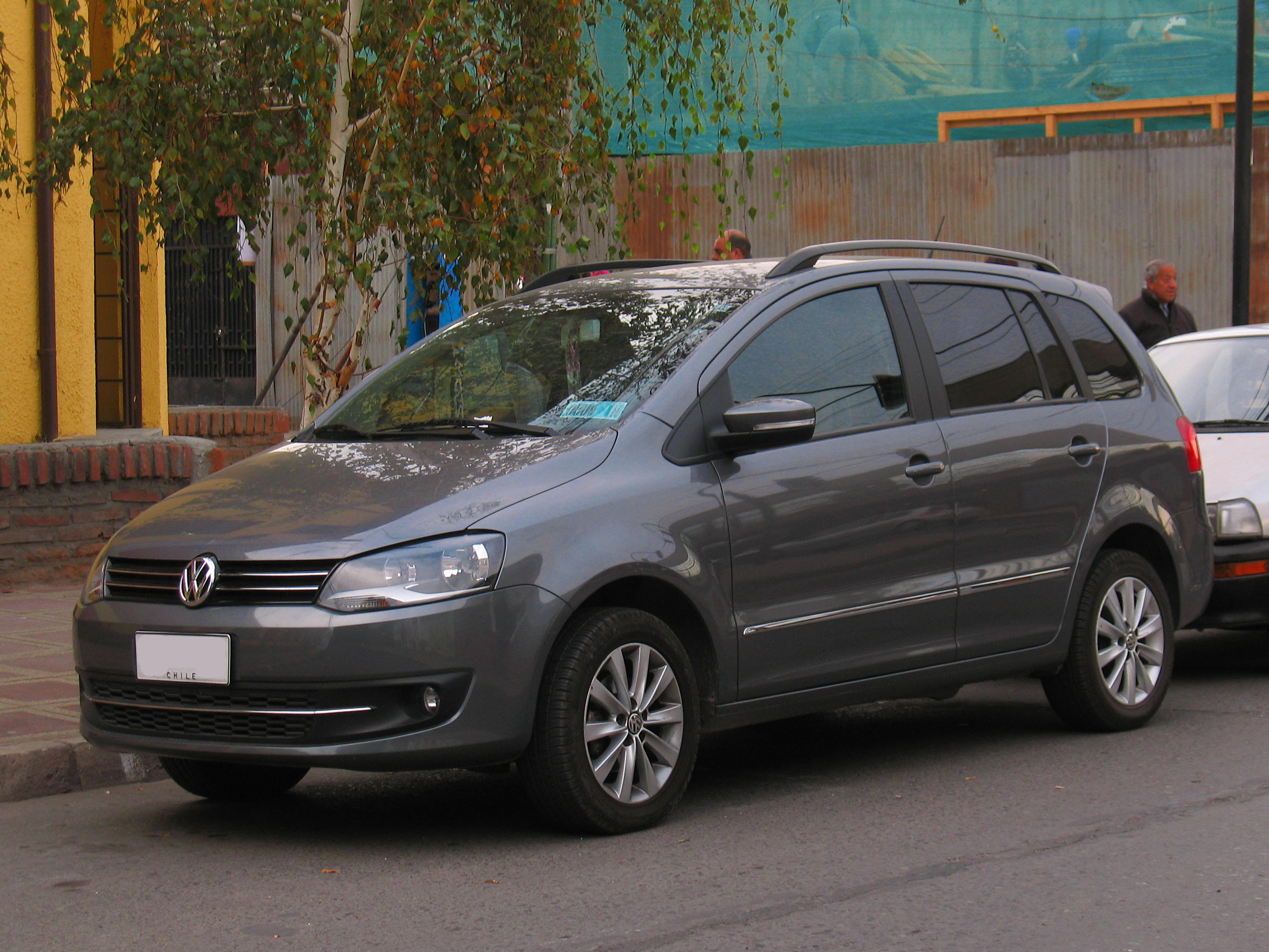 Volkswagen Suran 1.6 Highline 2011